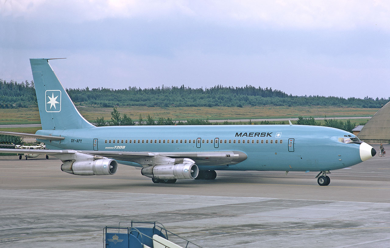 Maersk Air Boeing 720-051B OY-APY at Stockholm-Arlanda Airport